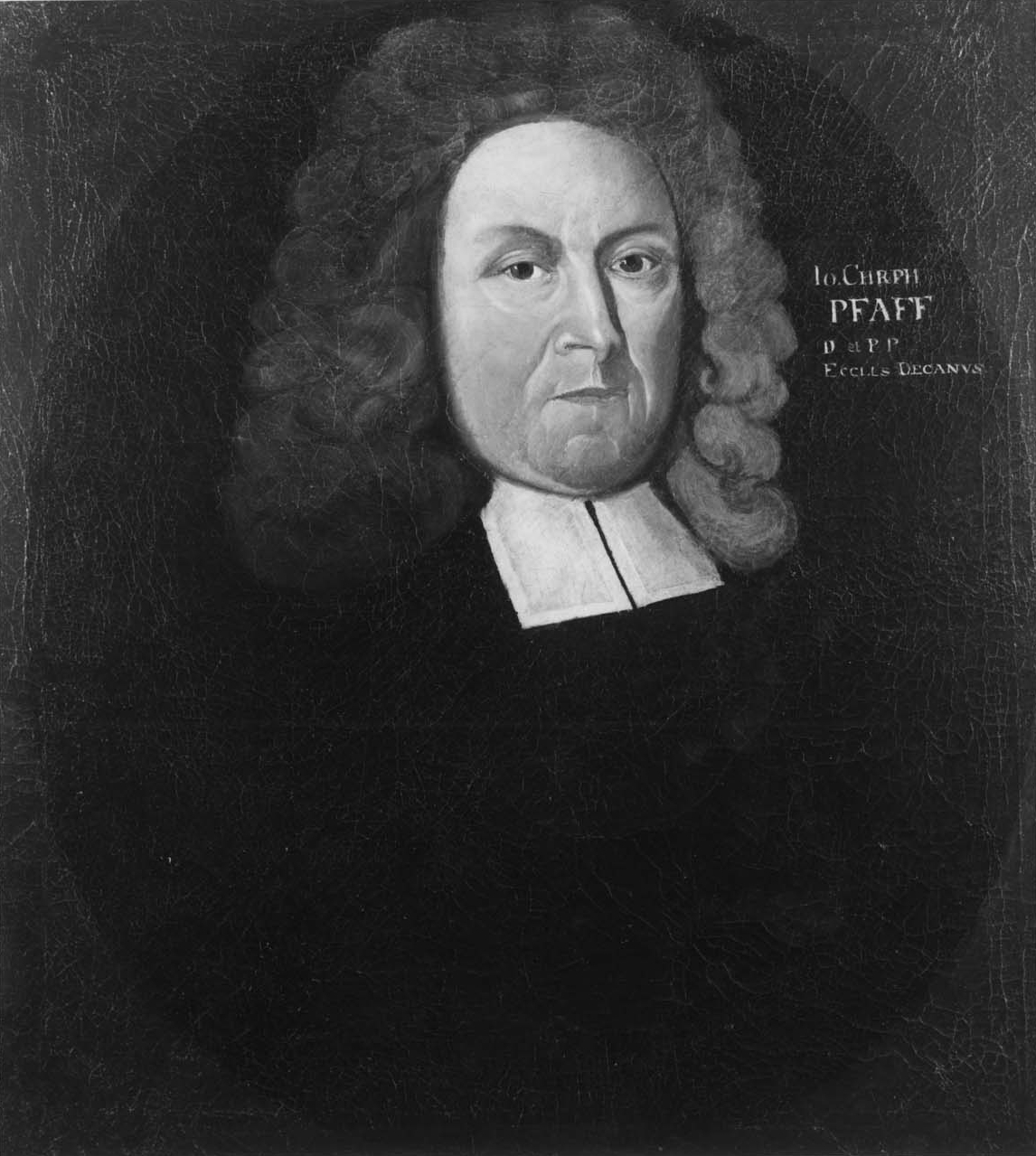 Johann Christoph Pfaff; Gemälde der Professorengalerie der Eberhard Karls Universität Tübingen Bezeichnung: „IO. CHRPH / PFAFF / D. et PP. / ECCLS DECANVS“ (o.r.) „J. Ch. Pfaff / Theol. F. n. 1651“ (Rahmenschild) Material: Öl auf Leinwand, Bild: 62,2 cm x 56,2 cm, Rahmen: 74,3 cm x 68,5 cm